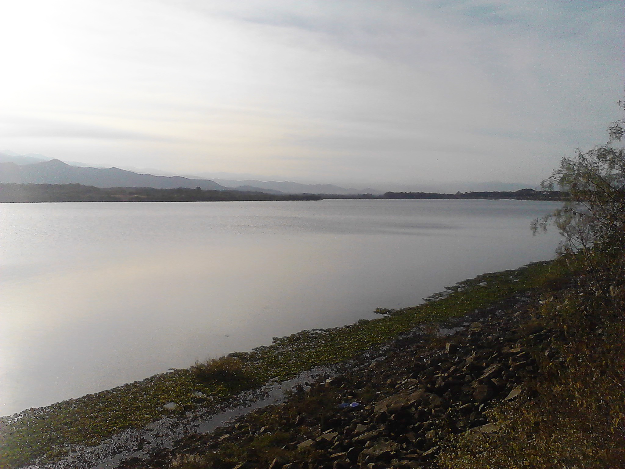 Lago San Jacinto bei Tarija, Bolivien